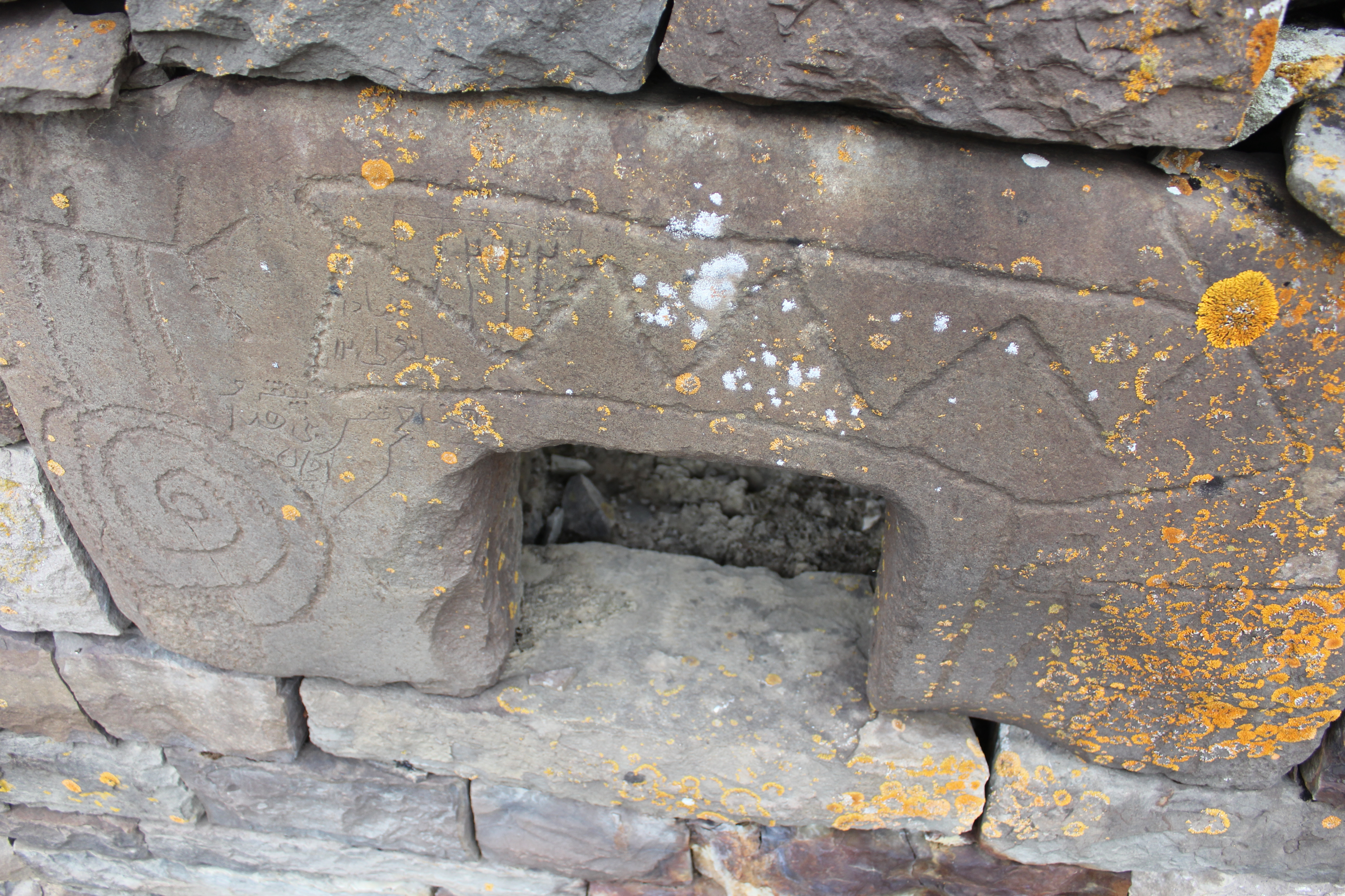 Арочный камень Моцкаройской мечети в Нашха. На сохранившемся арочном камне несколько петроглифов и дата возведения мечети.